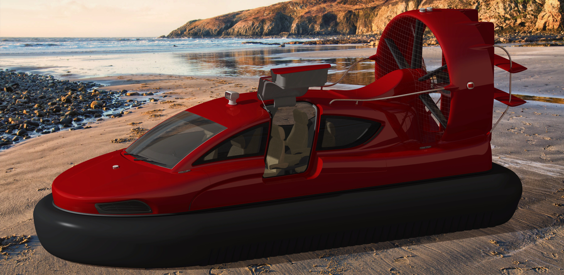 Современное судно на воздушной подушке Marshal